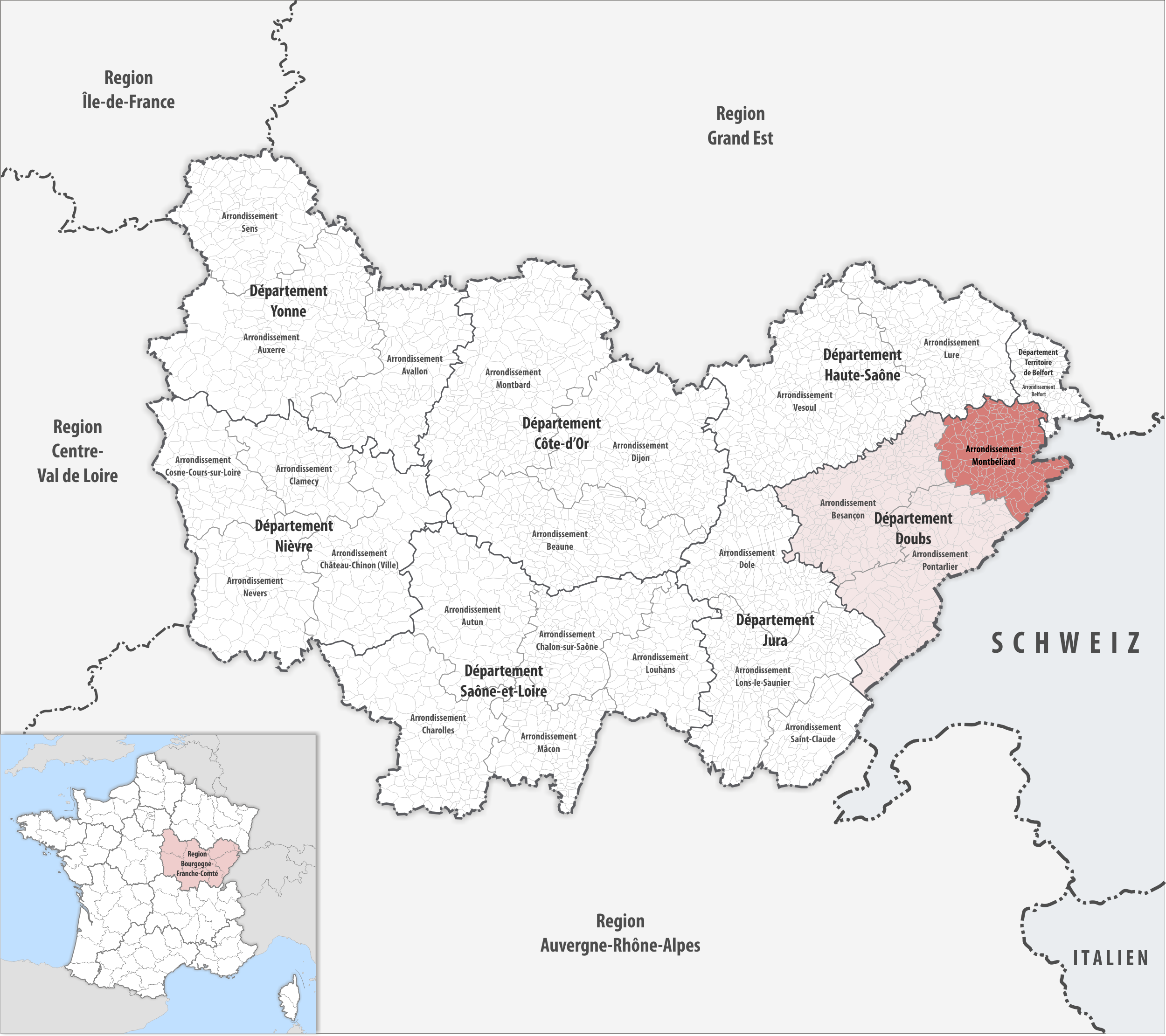 Lage des Arrondissements Montbéliard